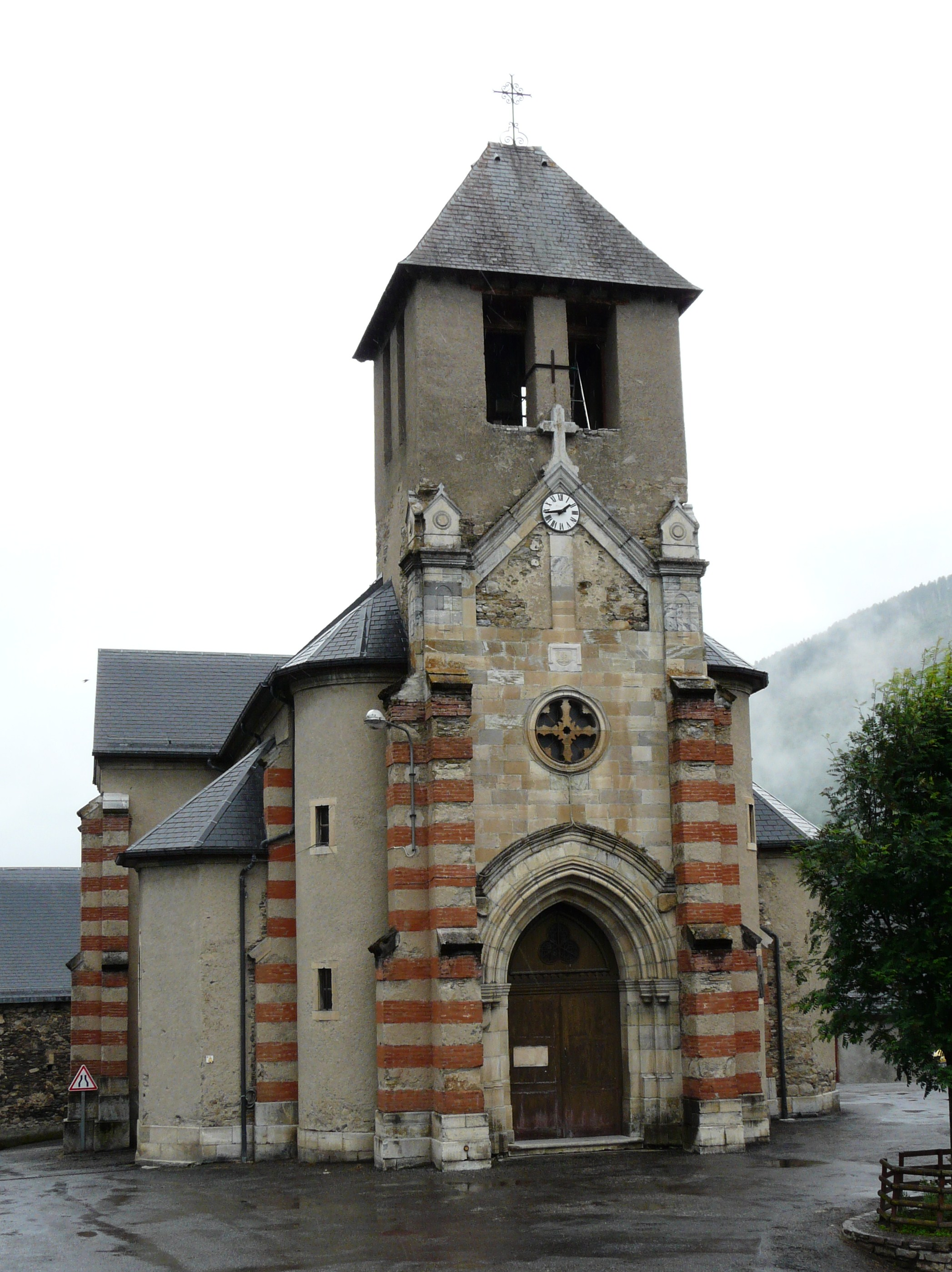 La façade occidentale de l'église Saint-Barthélemy de Castillon-de-Larboust, Haute-Garonne, France.